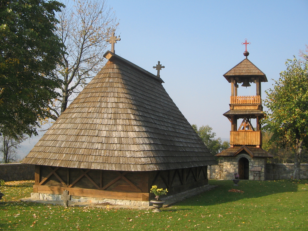 Crkva_brvnara_u_Javoranima